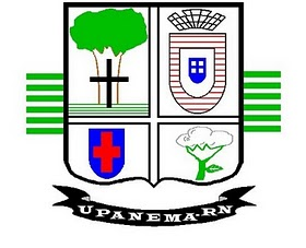 Bandeira de Upanema